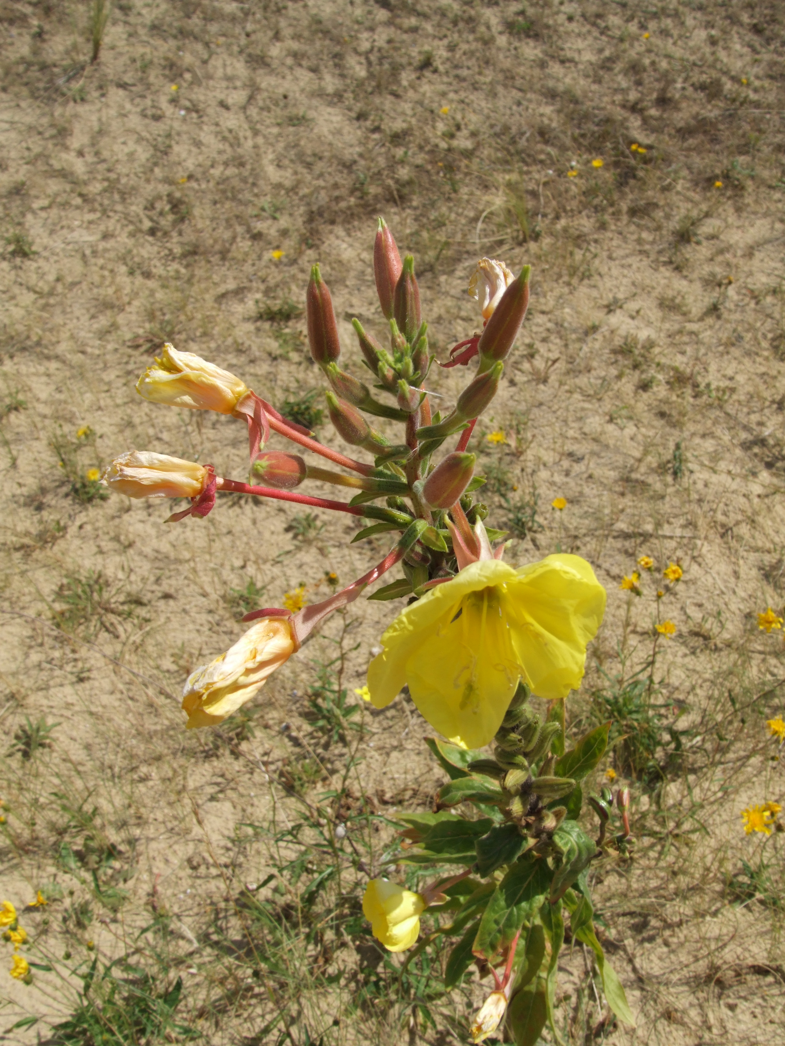 Oenothera erythrosepala - Große Nachtkerze - Grote teunisbloem - l'Onagre à sépales striés de rouge - Evening Primrose - Ort: Dune du Perroquet, Bray-Dunes, Frankreich - Blütenstand mit einer noch blühender Blüte